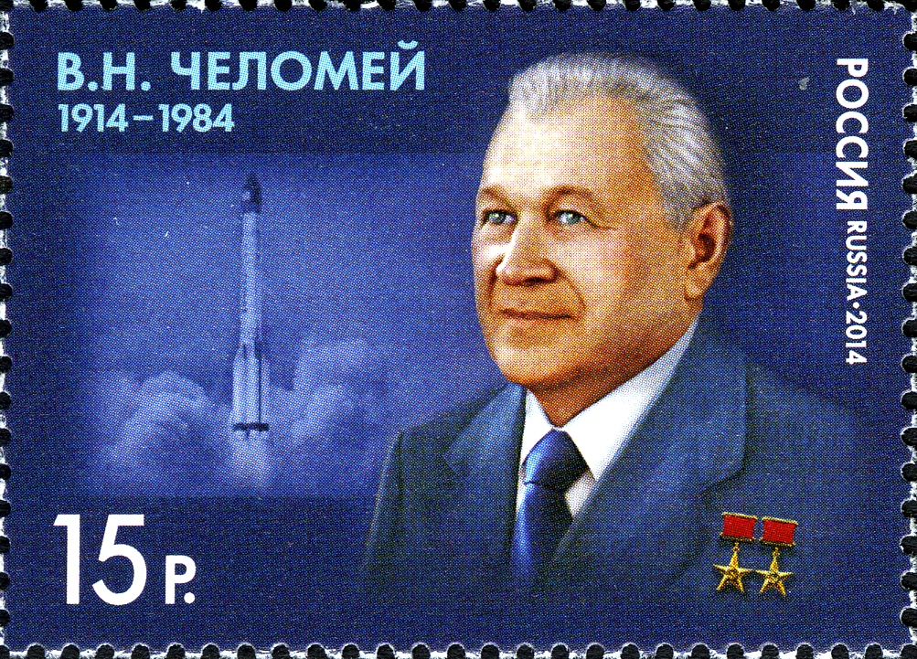 100 лет со дня рождения В.Н.Челомея (1914–1984), ученого